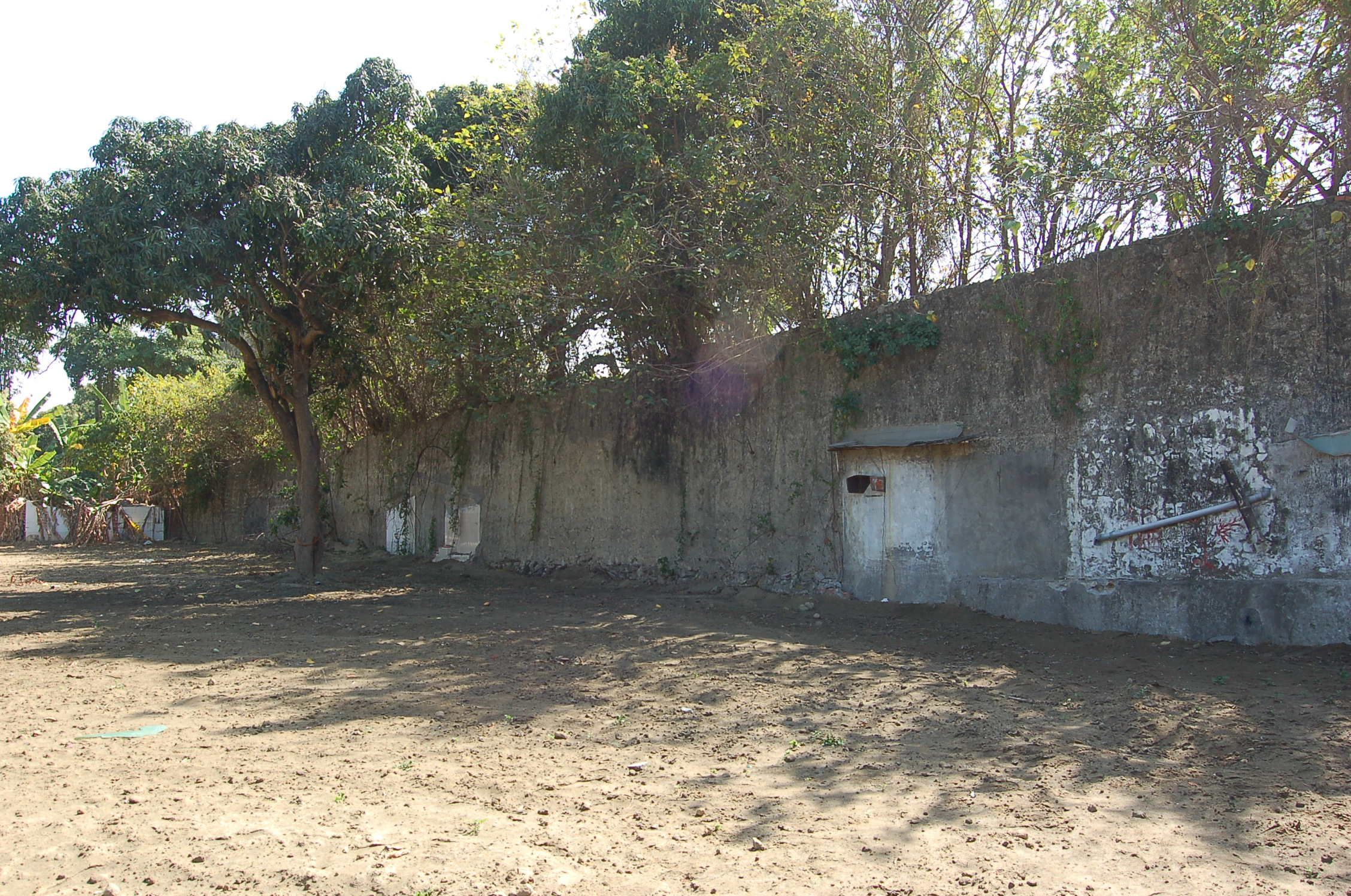 鳳山縣舊城西門段城牆，2014年2月份拍攝